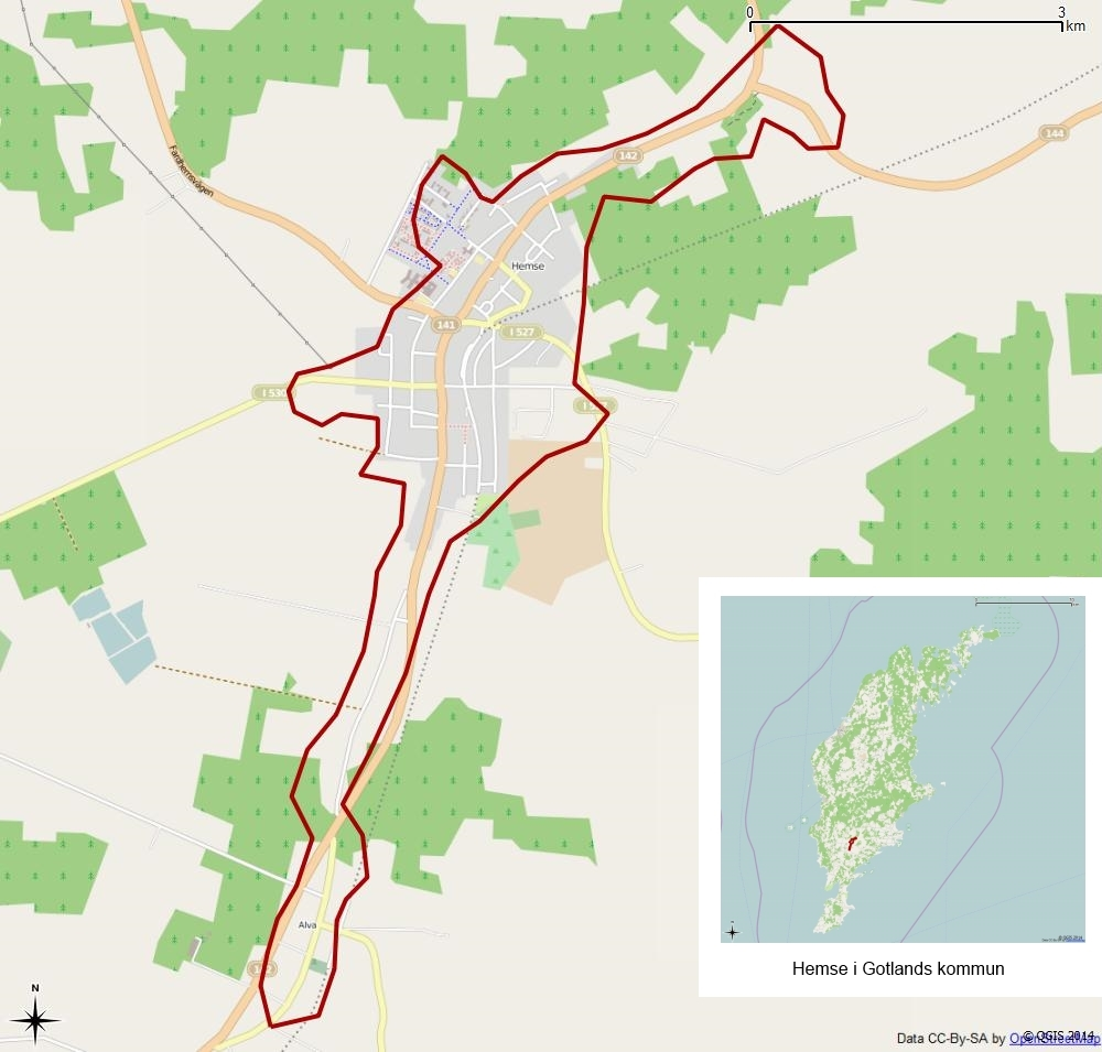 Tätorten Hemse gränser 1990 enligt Atlas över rikets indelningar 1992.